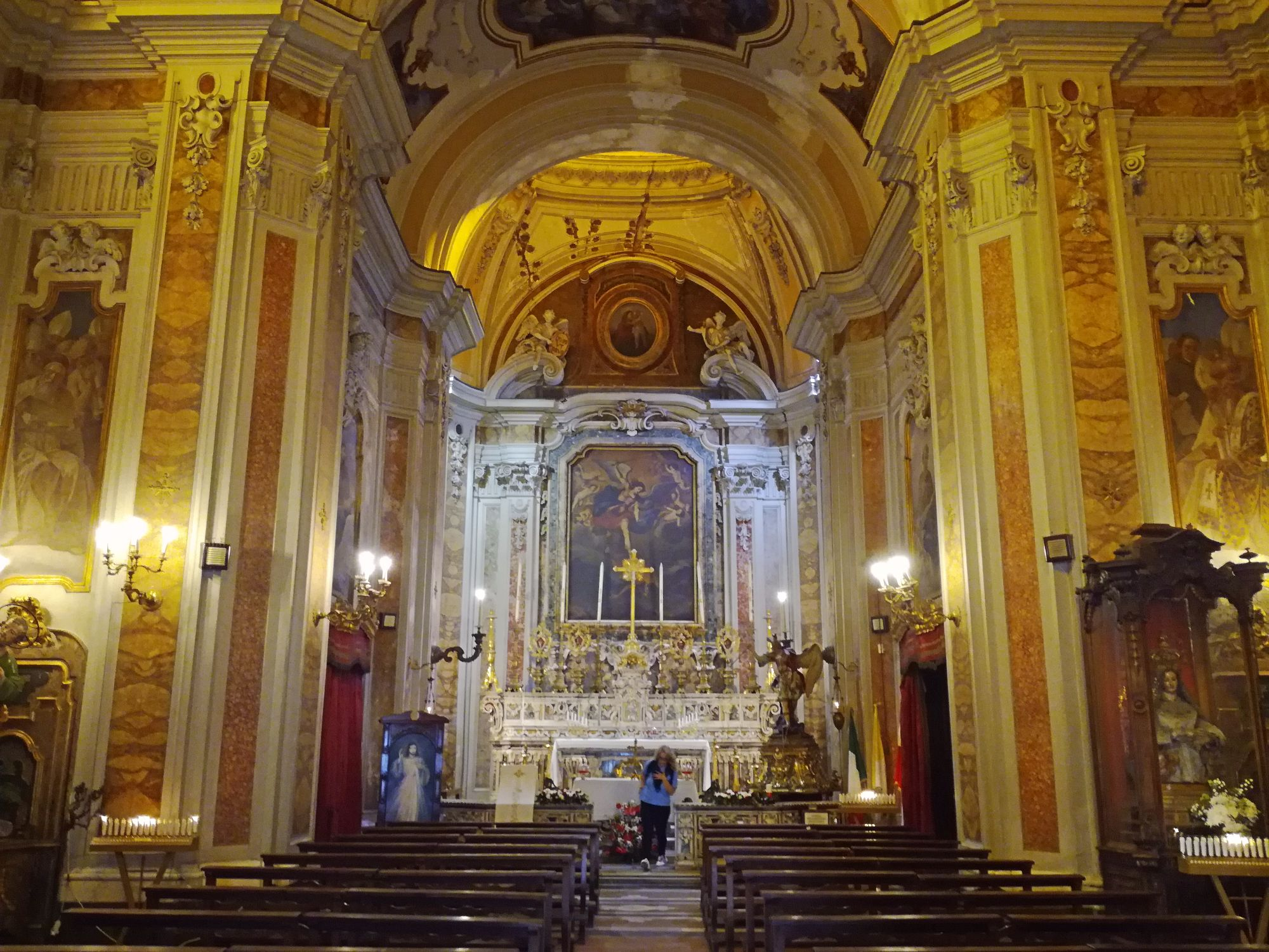 Interno Michele Arcangelo